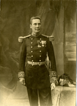 Général François Xavier Louis Henry Gaëtan Bonnier